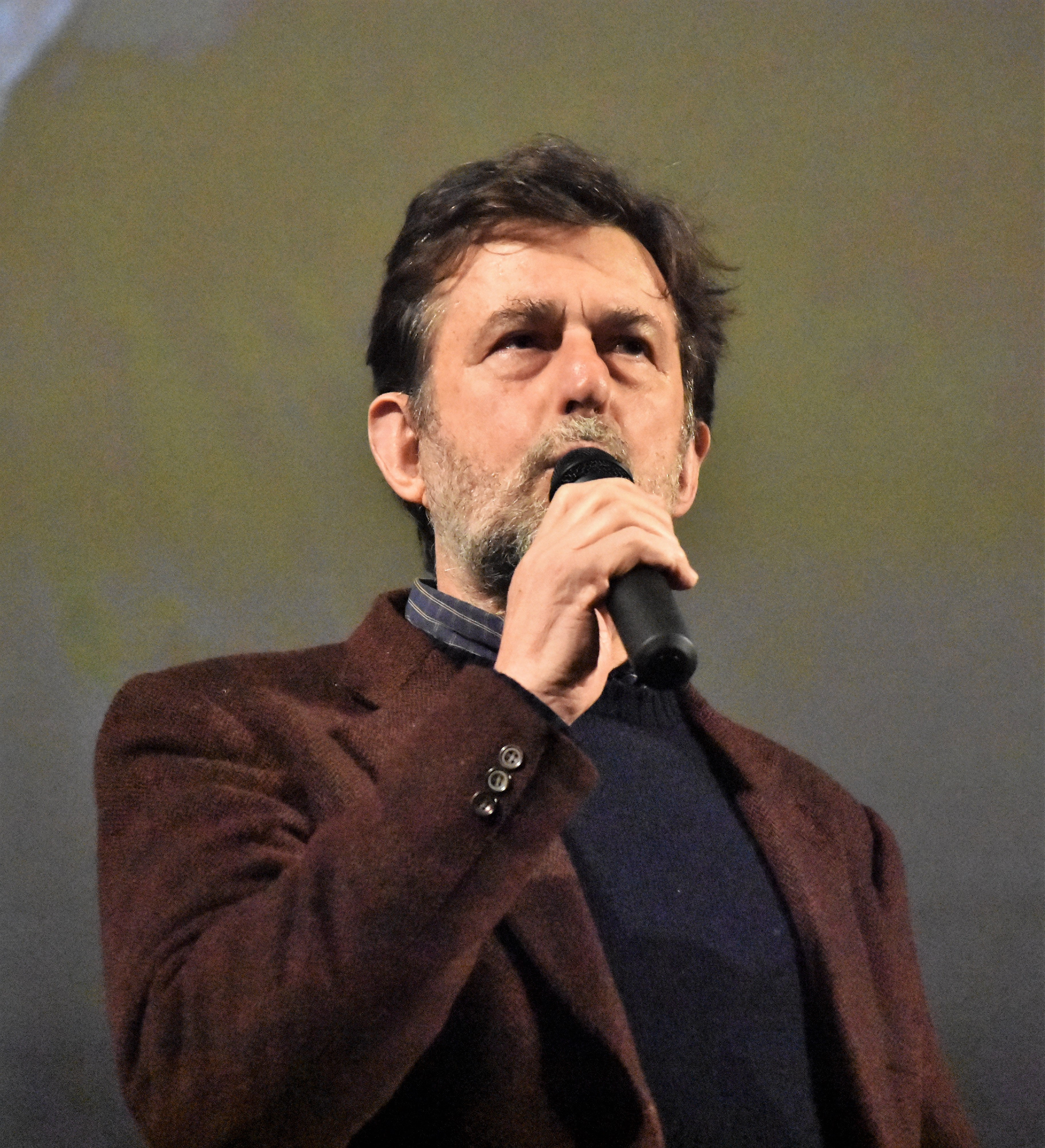 Nanni Moretti alla presentazione del suo film documentario Santiago, Italia